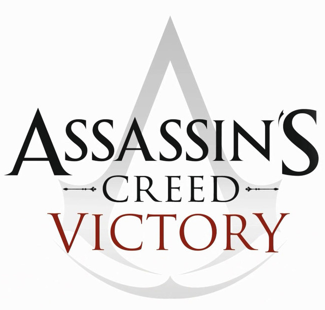 Logo officiel du jeu Assassin's Creed Victory